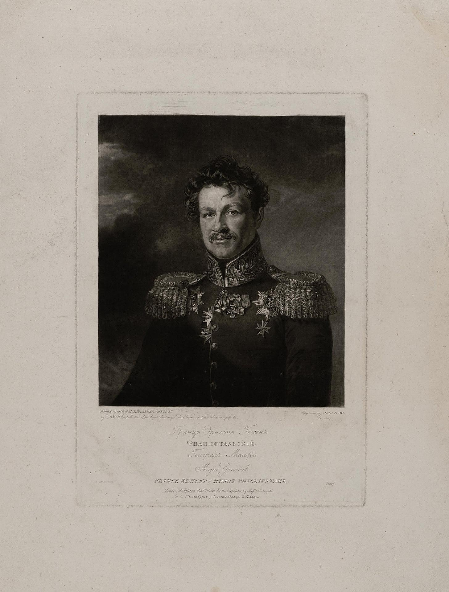 Портрет Эрнеста Гессена Филипстальского